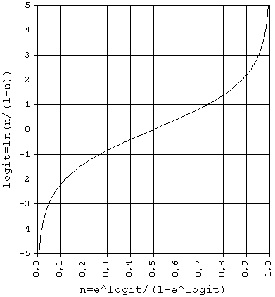 Die Logit-Funktion kann zur Linearisierung von Sigmoiden Kurven verwendet werden, und hat daher eine große Bedeutung für die Auswertung von ELISA-Kurven in der Biochemie erlangt. Gezeichnet am 16. Juni 2005 mit Hilfe von Microsoft Excel, und nachbearbeitet mit Microsoft Paint von Benutzer:Karl Bednarik.